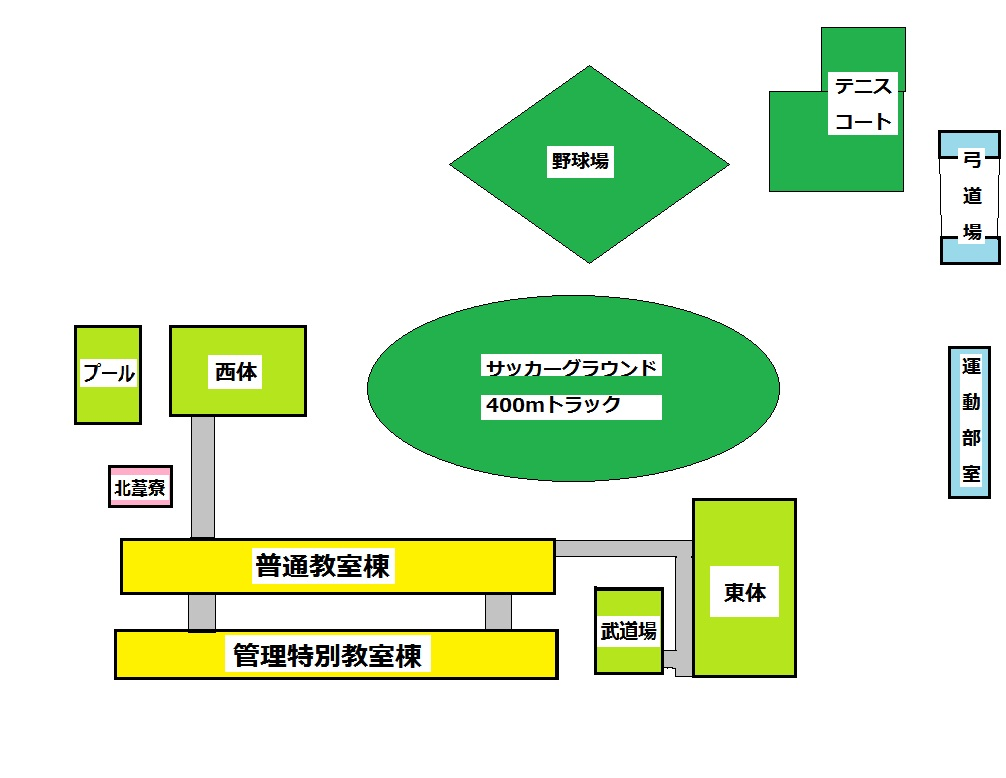 栃木県立宇都宮北高等学校の校内配置の簡略図です。